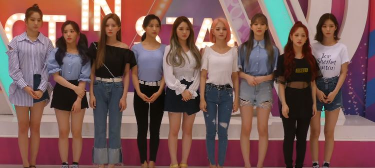 11일 오전 서울시 마포구 서교동 상암동 tbs 오픈스튜디오에서 프로미스나인(노지선, 송하영, 이새롬, 이채영, 이나경, 박지원, 이서연, 백지헌, 장규리)이 팩트인스타 스타인터뷰 녹화에 참여해 포토타임을 갖고 있다.